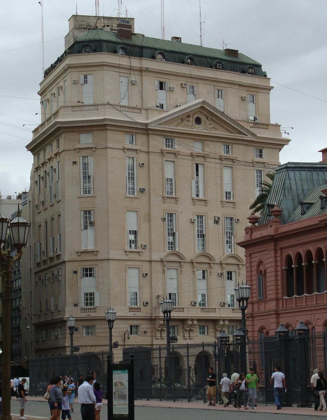 Edificio Martínez de Hoz, sede de la Secretaría de Inteligencia de la Argentina. Proyectado por el arquitecto Alejandro Bustillo. Calle 25 de Mayo Nº 11, Buenos Aires, Argentina.